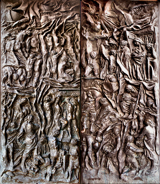 Porta da Paz, de autoria de Augusto Murer, na Igreja de São Pelegrino, Caxias do Sul, Rio Grande do Sul, Brasil.